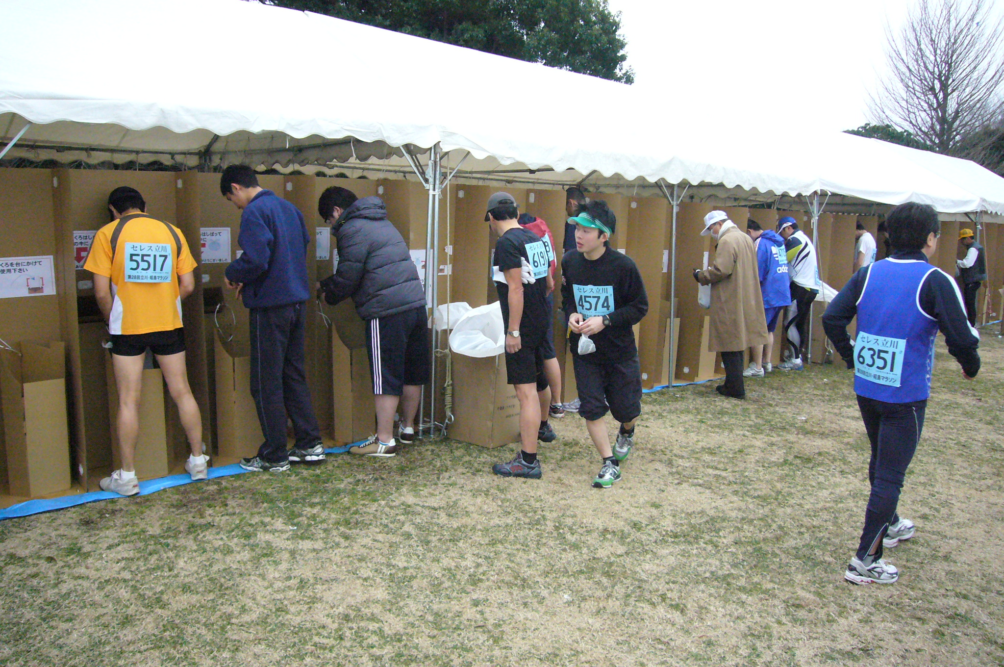 エコ・トイレ。レジ袋の中にします。中におがくずのようなものが入ってます。 reference 第28回 立川・昭島マラソン Composting toilet